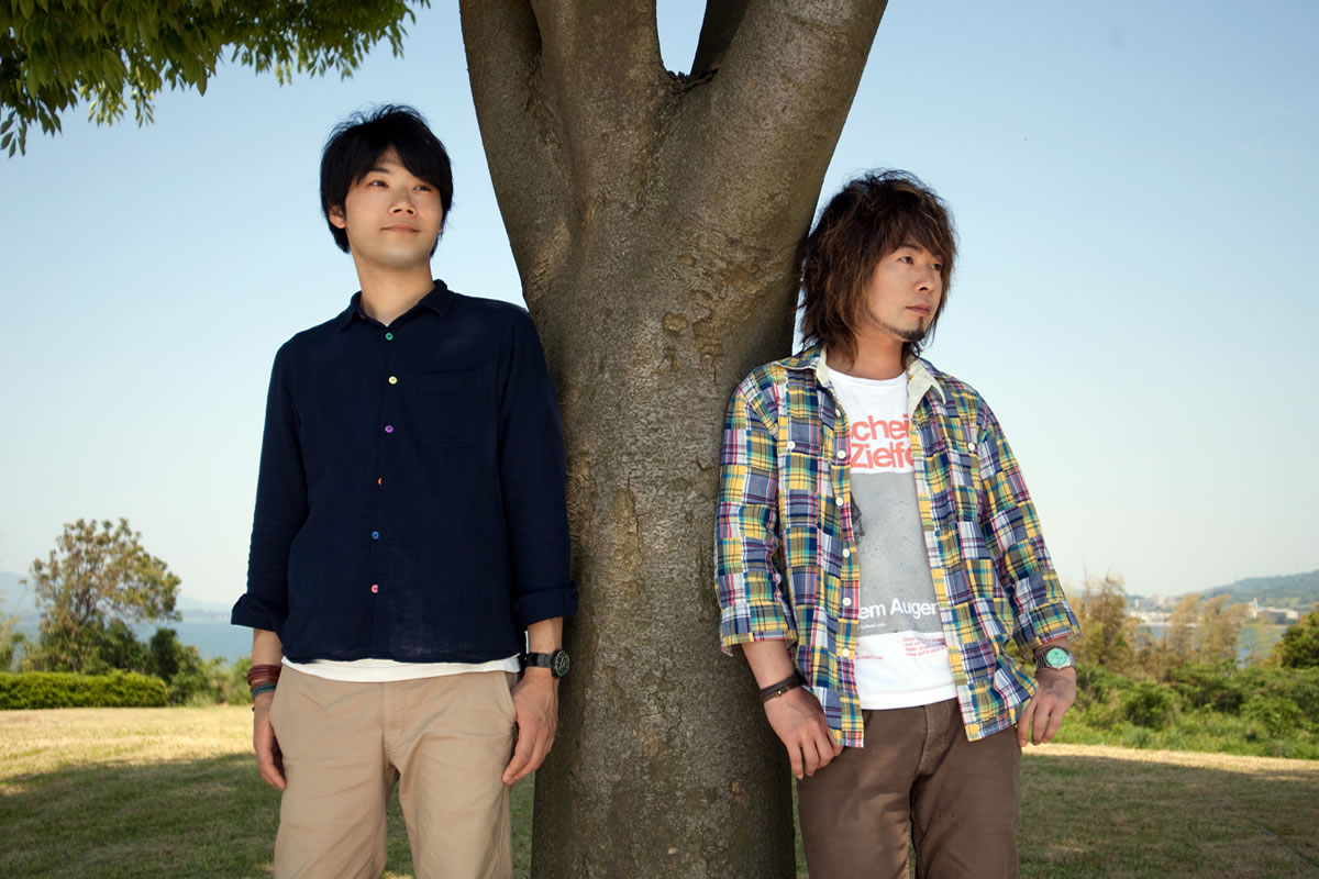 KUROKO∞SHOWの写真